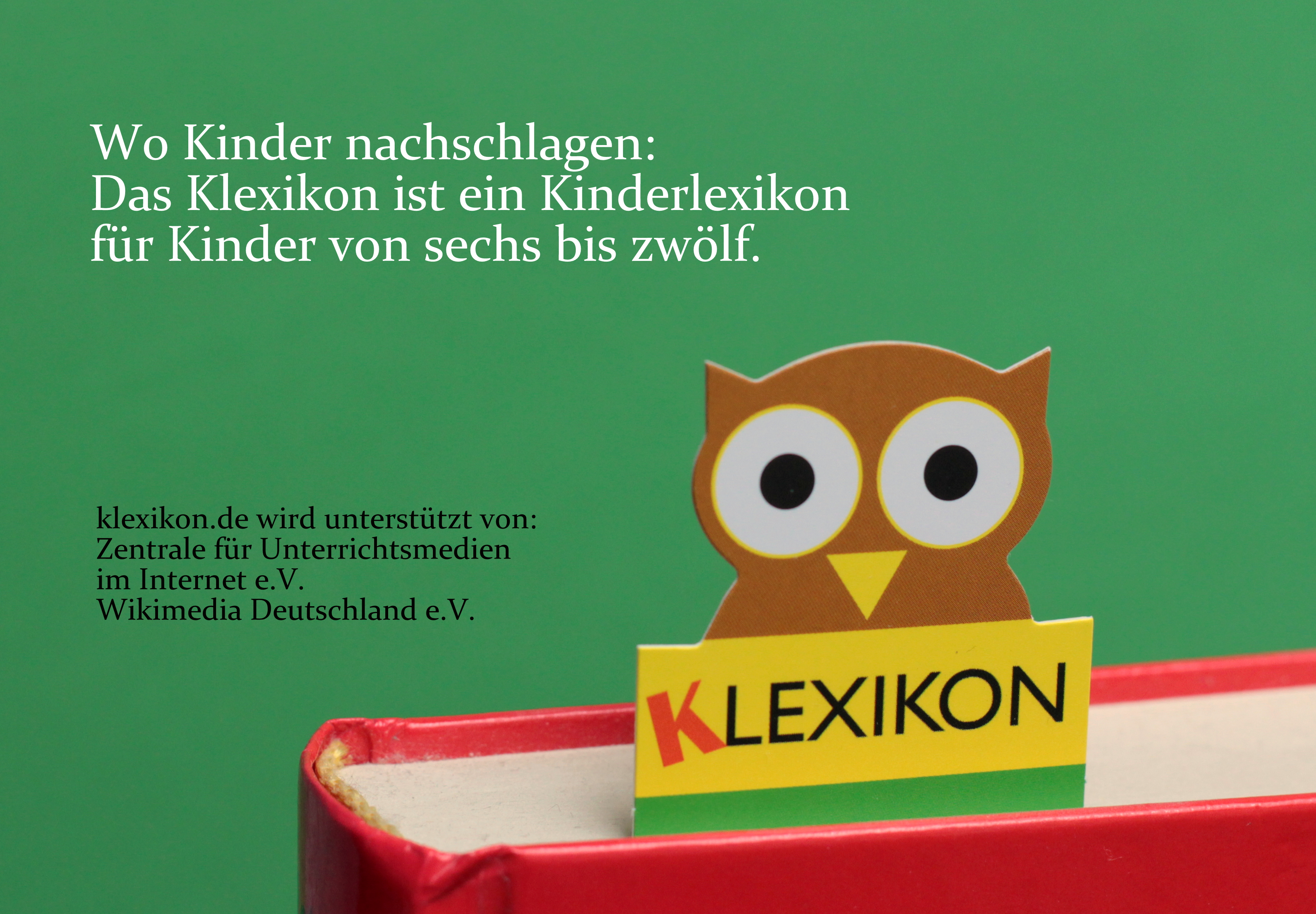 Lesezeichen mit Klexikon-Eule, unterstützt von Wikimedia Deutschland.